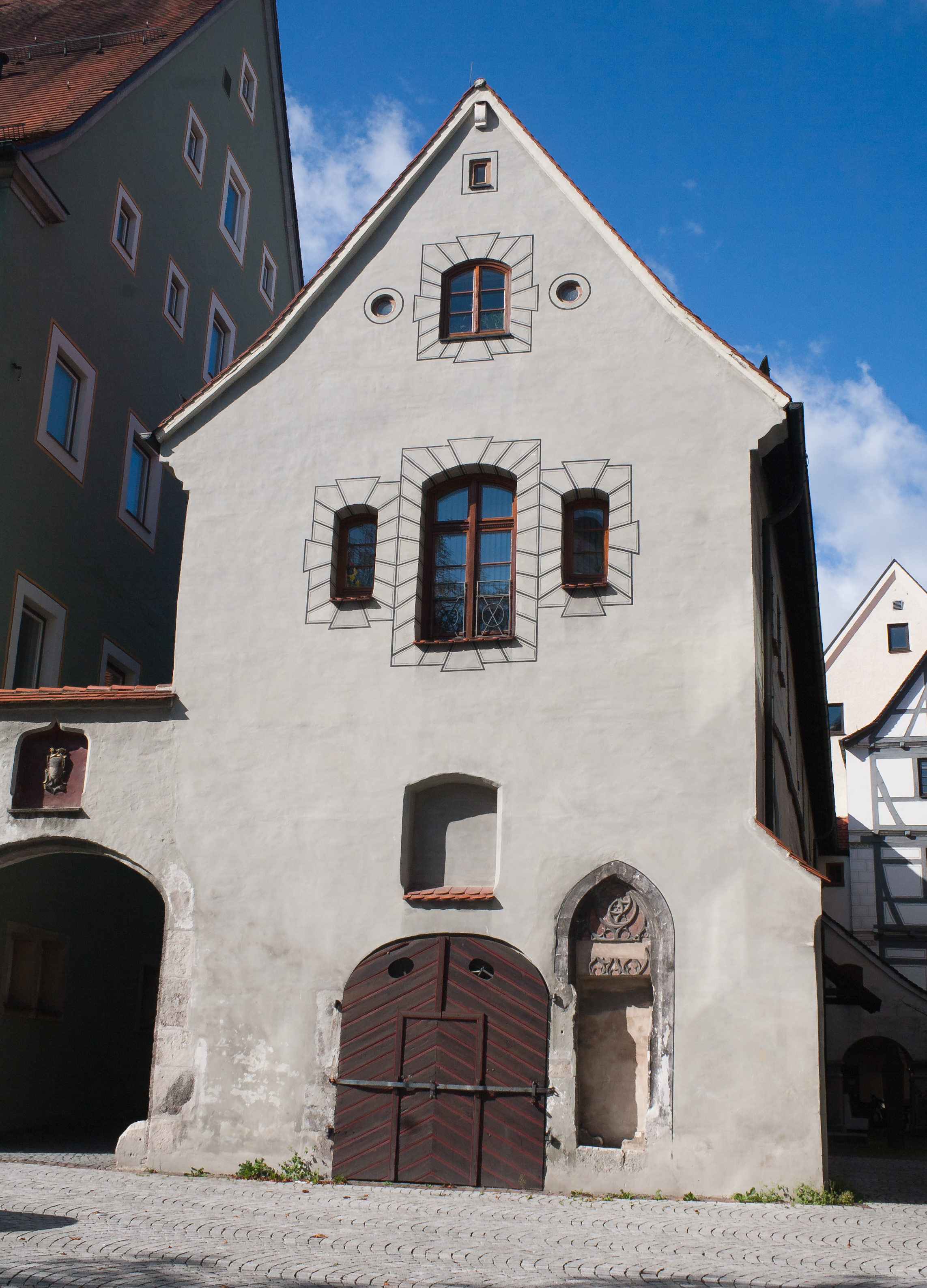 Ulm, Baden-Württemberg, Germany